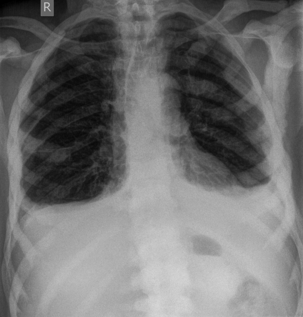 Osteoplastische Metastasierung bei einem Patienten mit Prostata-Karzinom: Nahezu alle Anteile des Thorax-Skeletts sind betroffen.